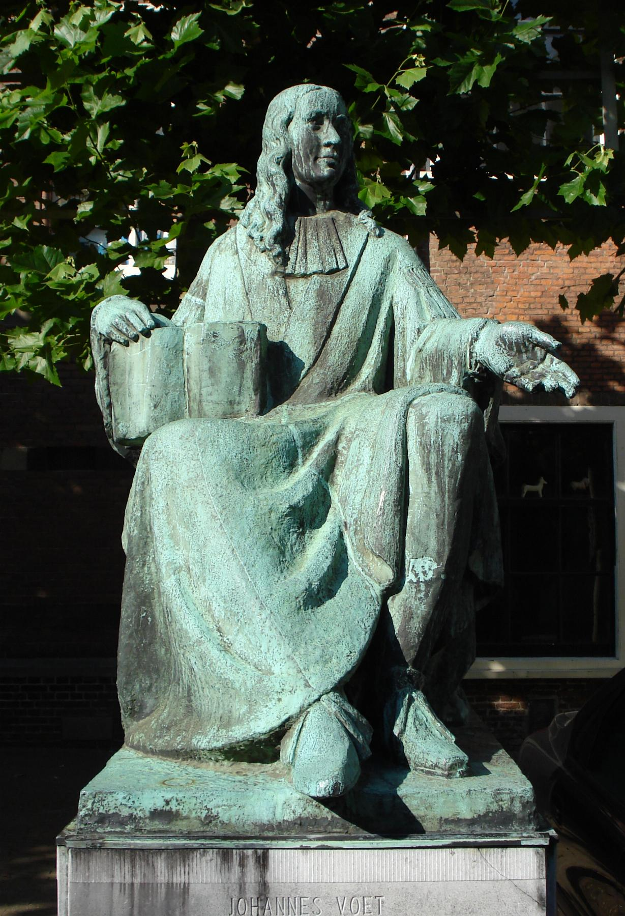 Den Haag, Kazernestraat. Kunstwerk "Johannes Voet" van Mari Andriessen. The Hague/The Netherlands.